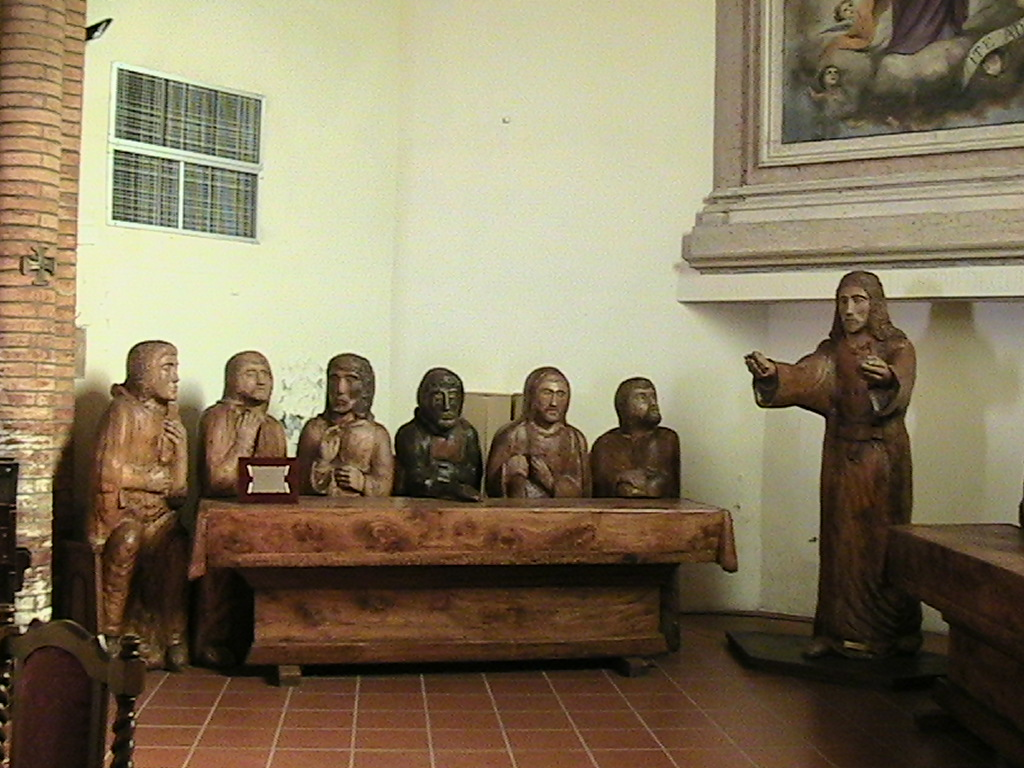 Pellegrino Parmense - chiesa parrocchiale di San Giuseppe -statue lignee Ultima Cena (Walter Benecchi)